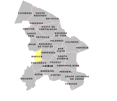 Localisation de Barosa sur la freguesia de Leiria